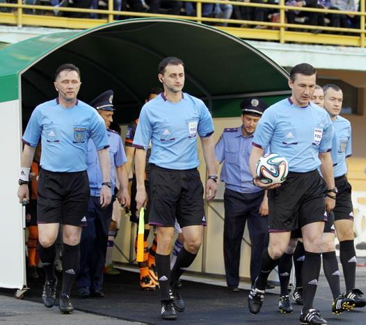 Юрій Можаровський з бригадою арбітрів на фіналі Кубку України 2014 року